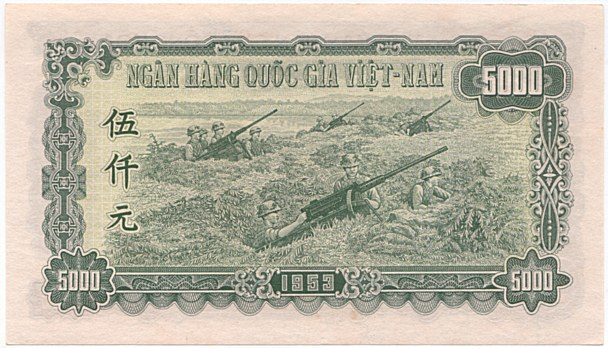 Vietnam Dongs.